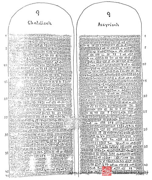 کوردی: بەردی کێلەشین